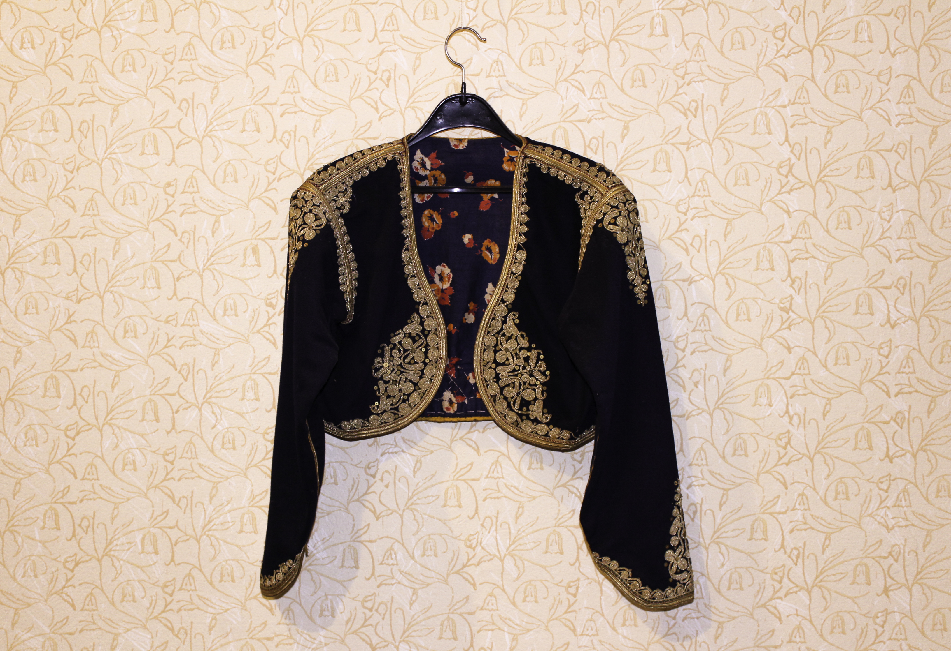 Libada, ženski odjevni predmet - dio etnografske postavke Muzeja Stare Hercegovine u Foči.